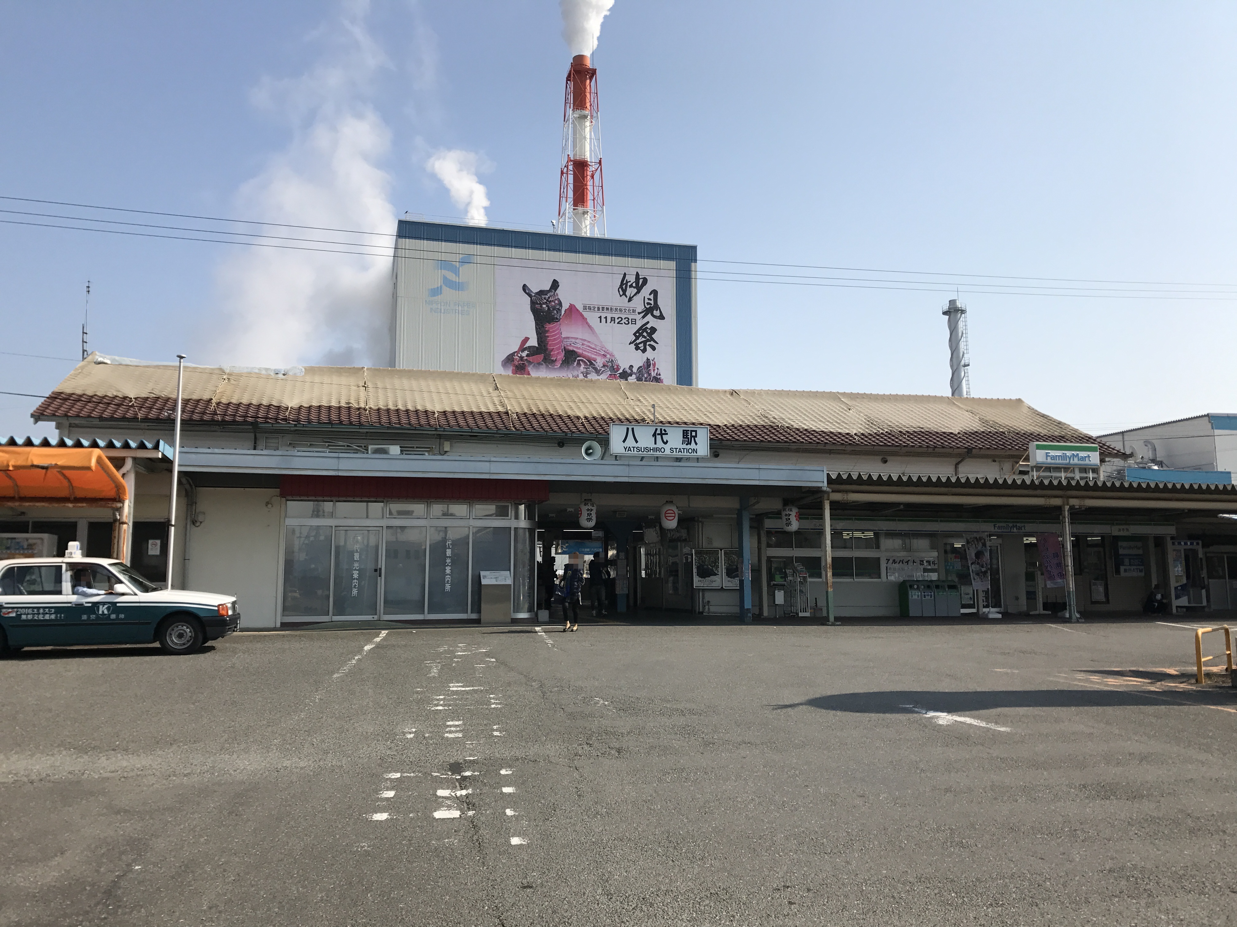 八代駅駅舎